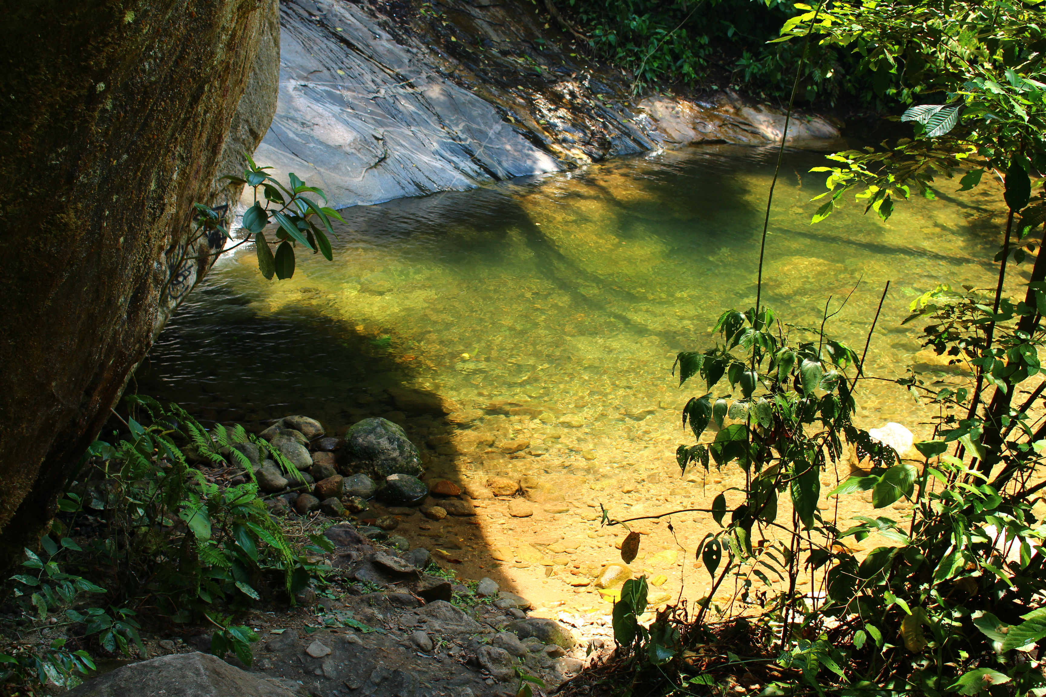 Parque Natural Municipal da Taquara, Duque de Caxias, RJ